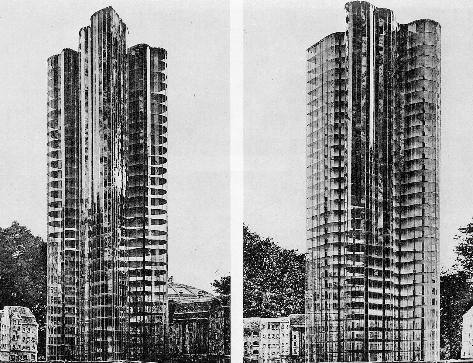 Mies van der Rohe, Maquette exposée à Paris en 1923 (image du domaine public modifiée)